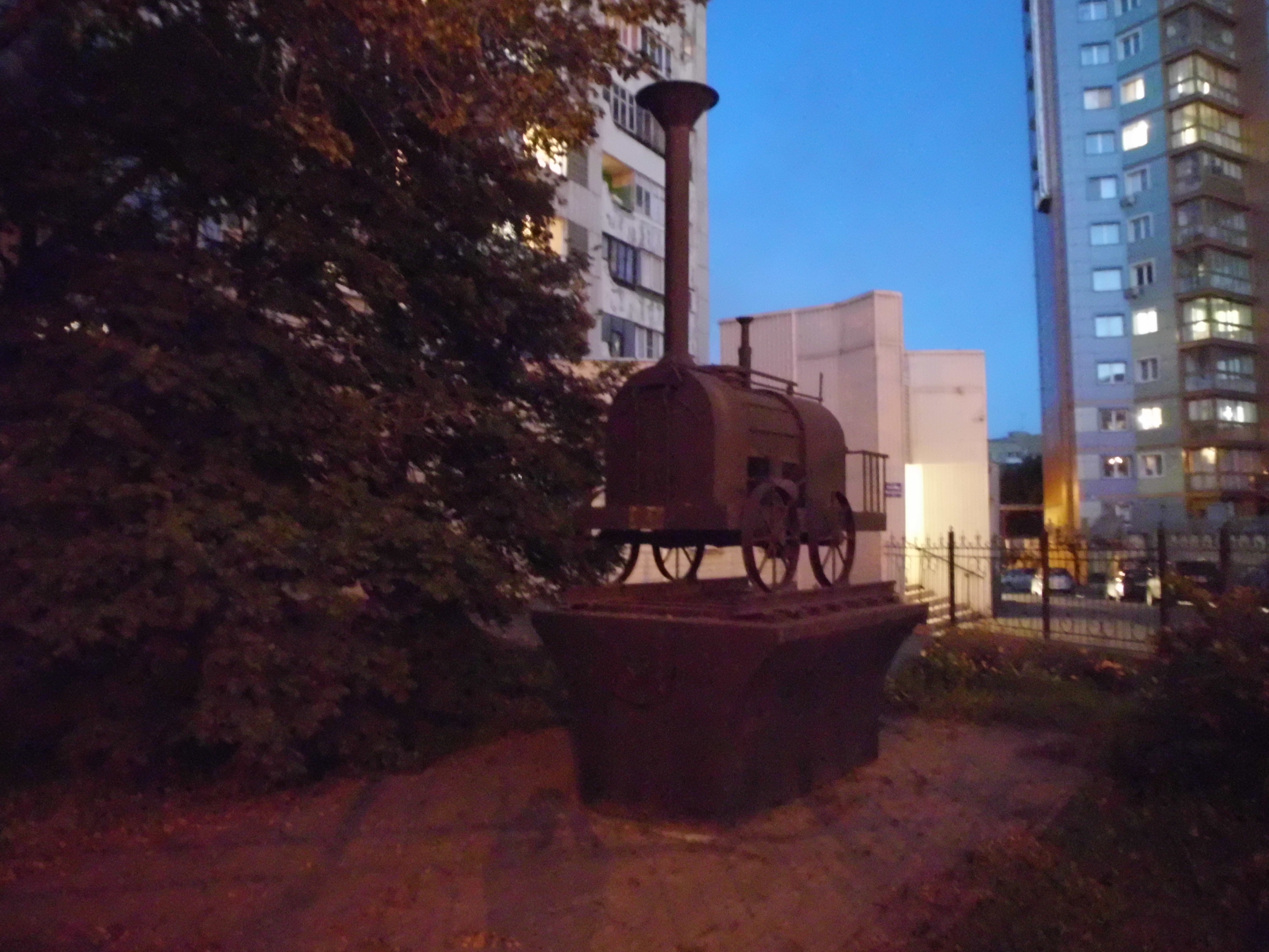 Музей истории Южно-Уральской железной дороги. Город Челябинск, ул. Цвиллинга, 63. Памятник паровозу Черепановых по месту прежнего расположения музея.